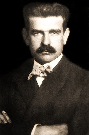 Frederic Storck (Fritz, n. 19 ianuarie 1872, București - d. 26 decembrie 1942)